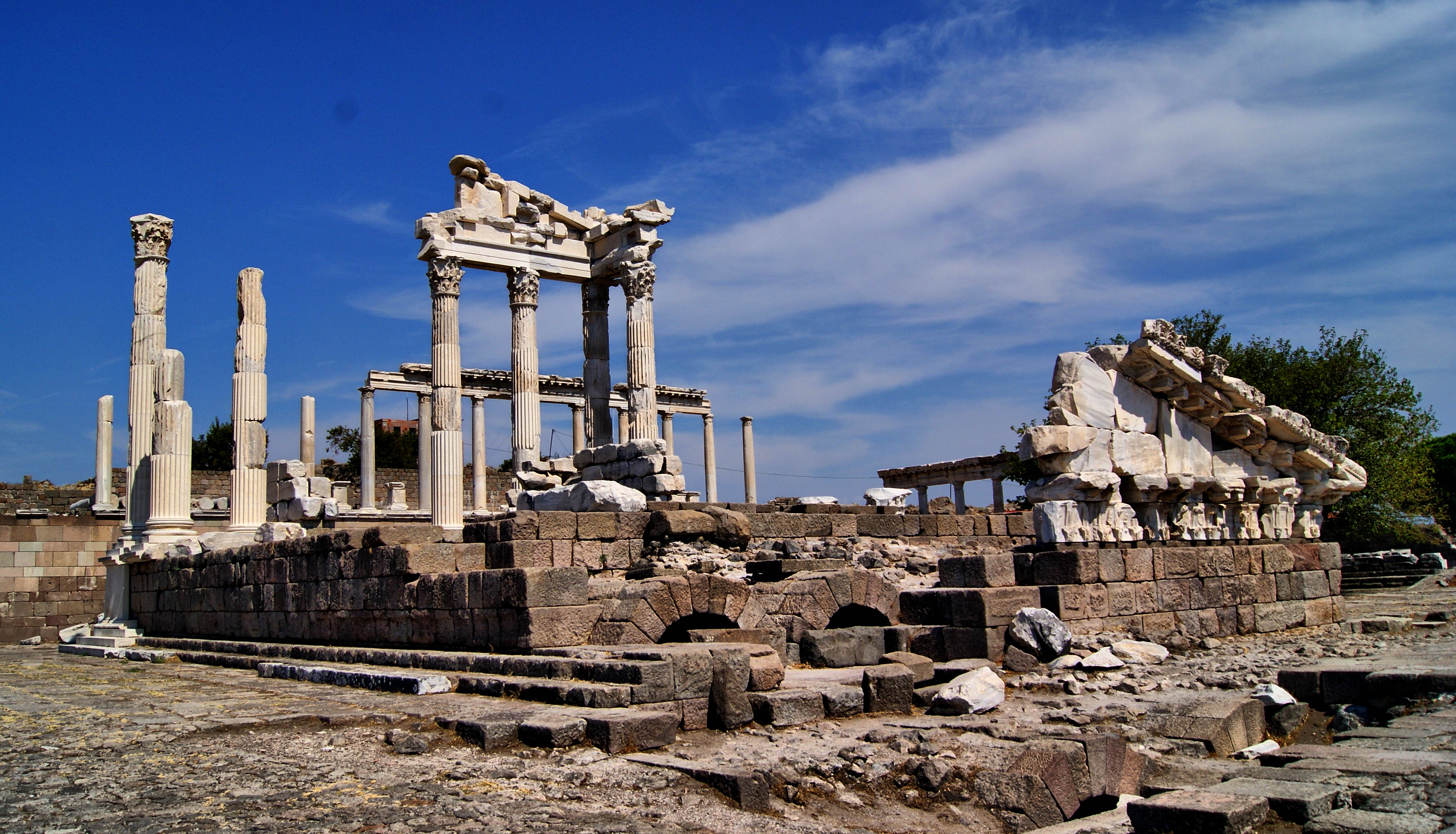 Bergama - AKRAPOL